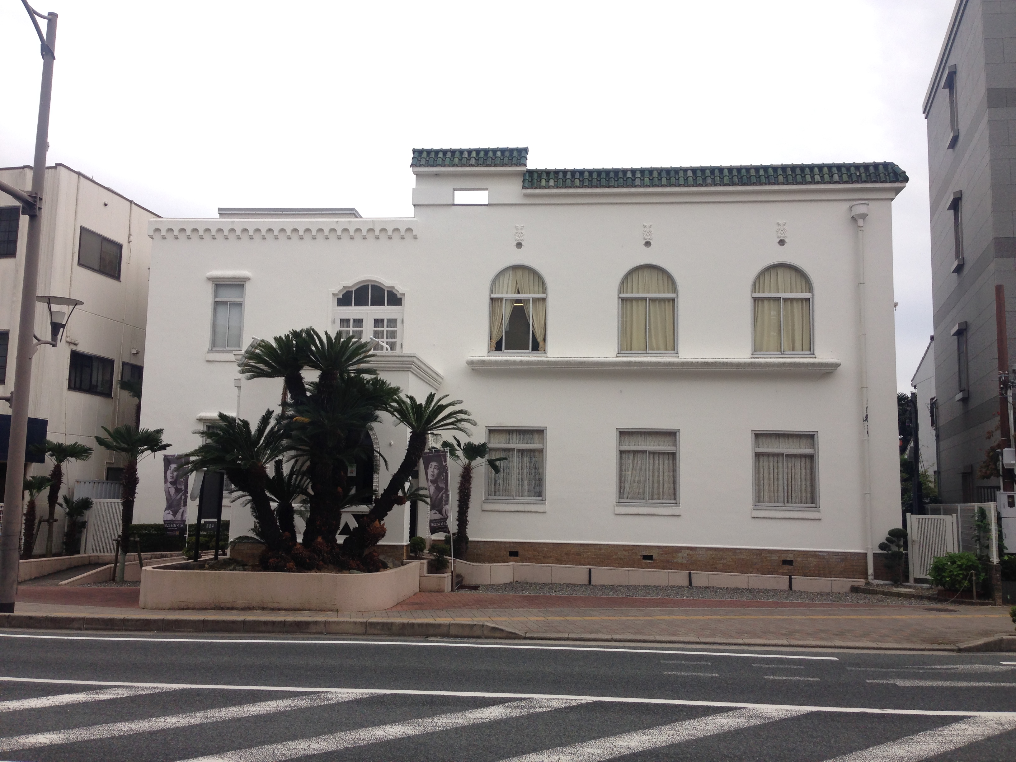 木下惠介記念館外観（正面）